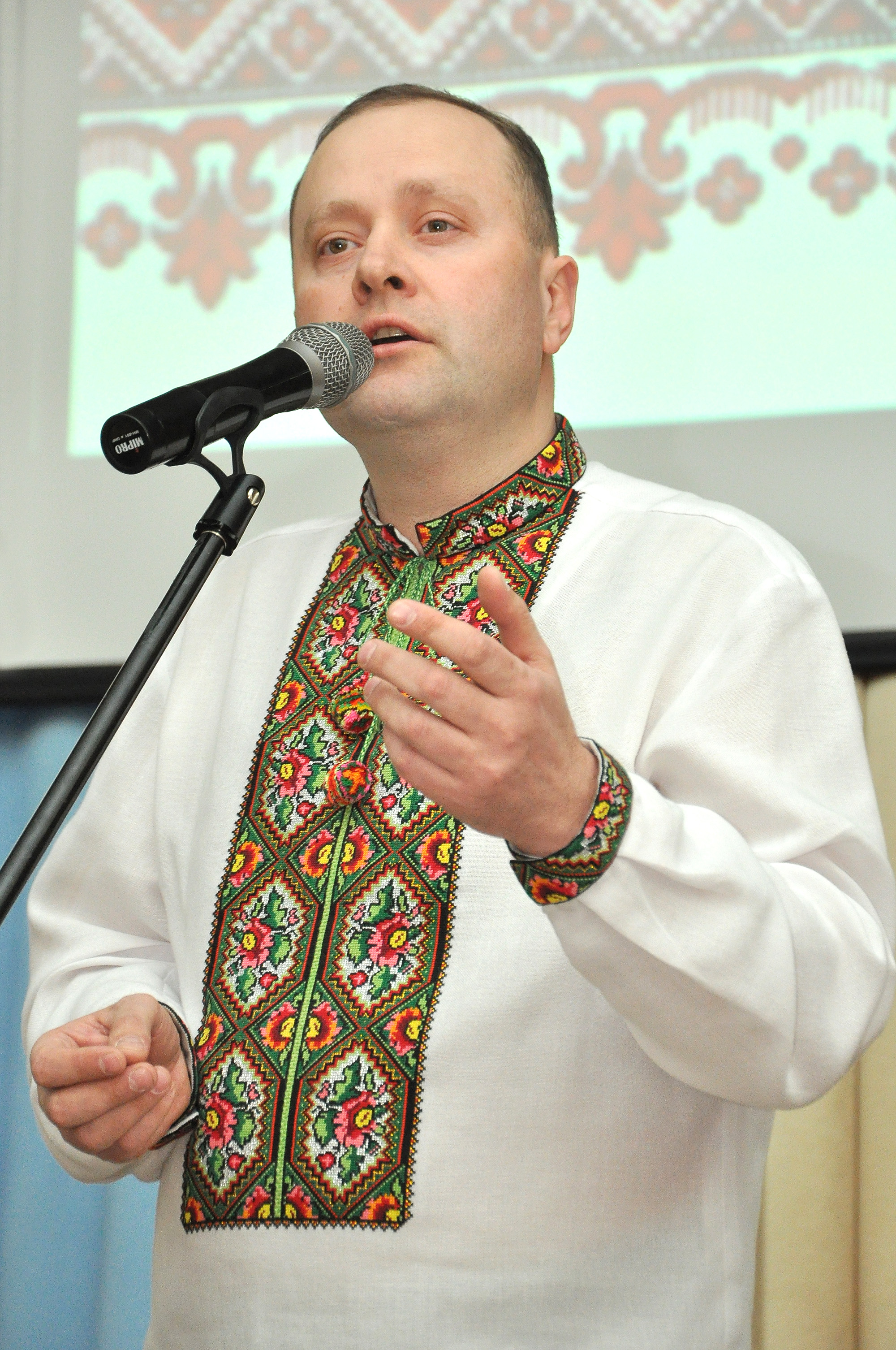 Український хірург, співак Юрій Футуйма на вечорі пам'яті з нагоди 202-ої річниці від дня народження Тараса Шевченка в Тернопільському державному медичному університеті 10 березня 2016 року